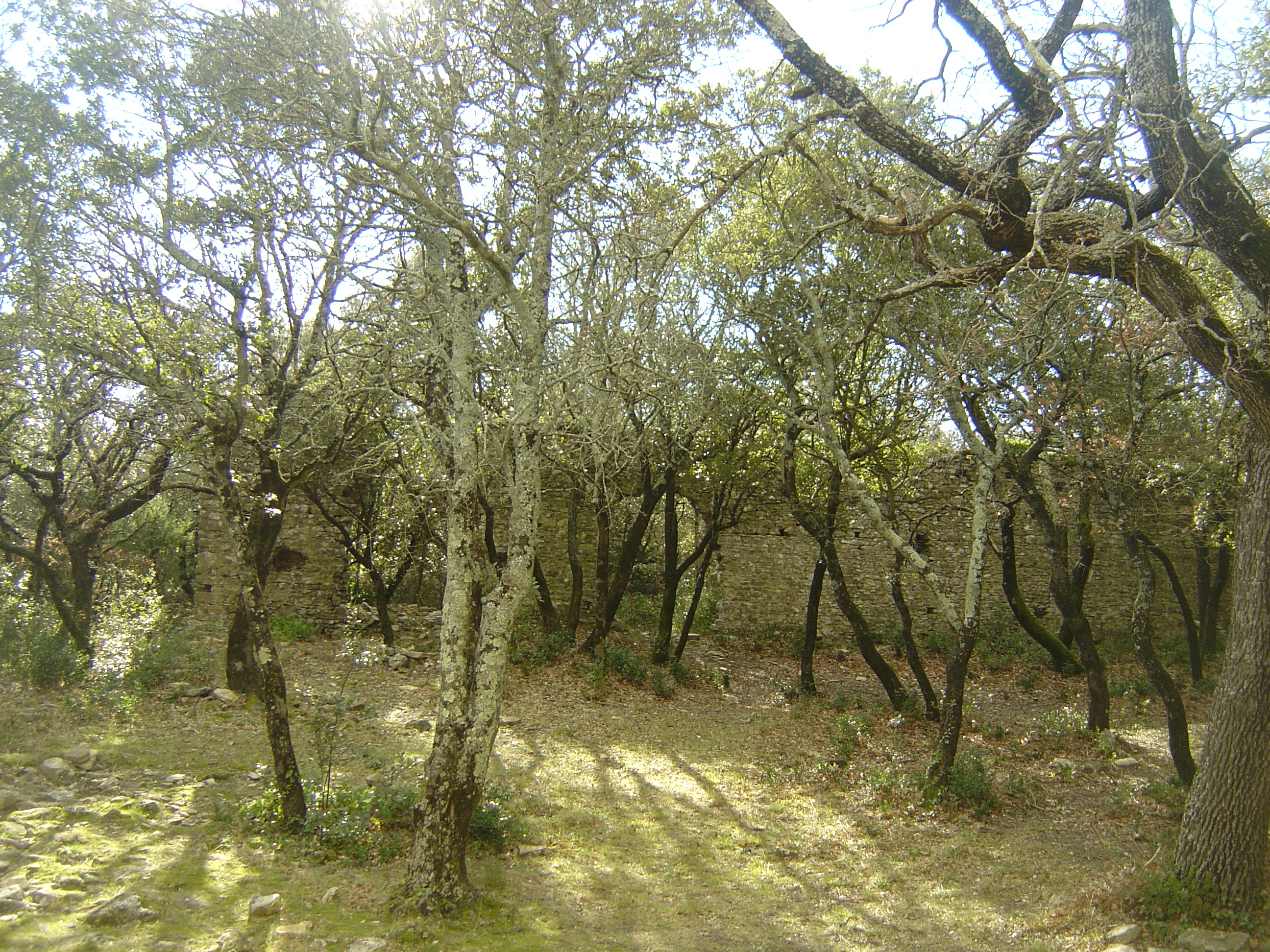 Chapelle Saint-Pierre de Castres (227m) sur le plateau de Lacau. Ruines derrière les arbres